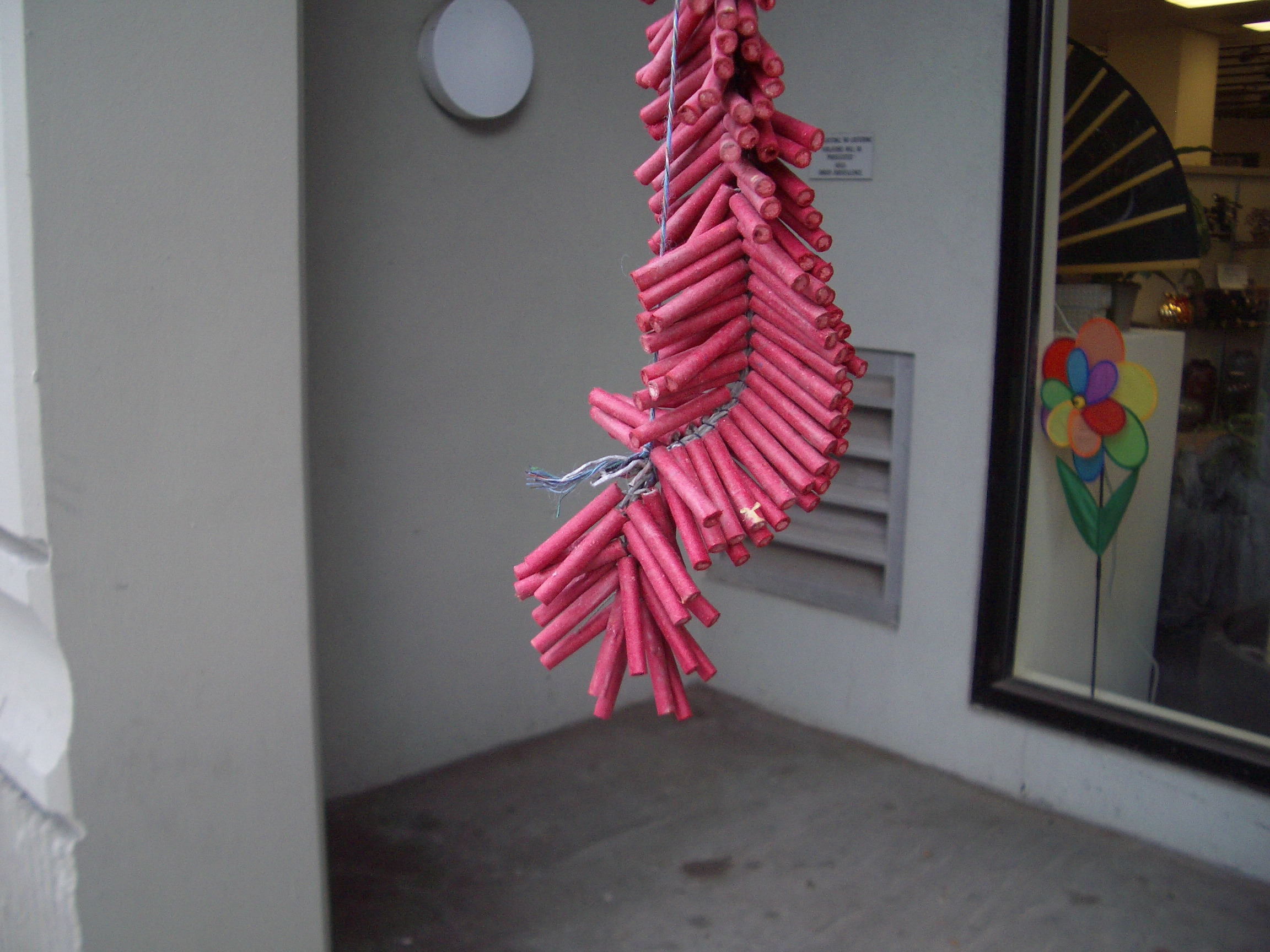 Firecracker String